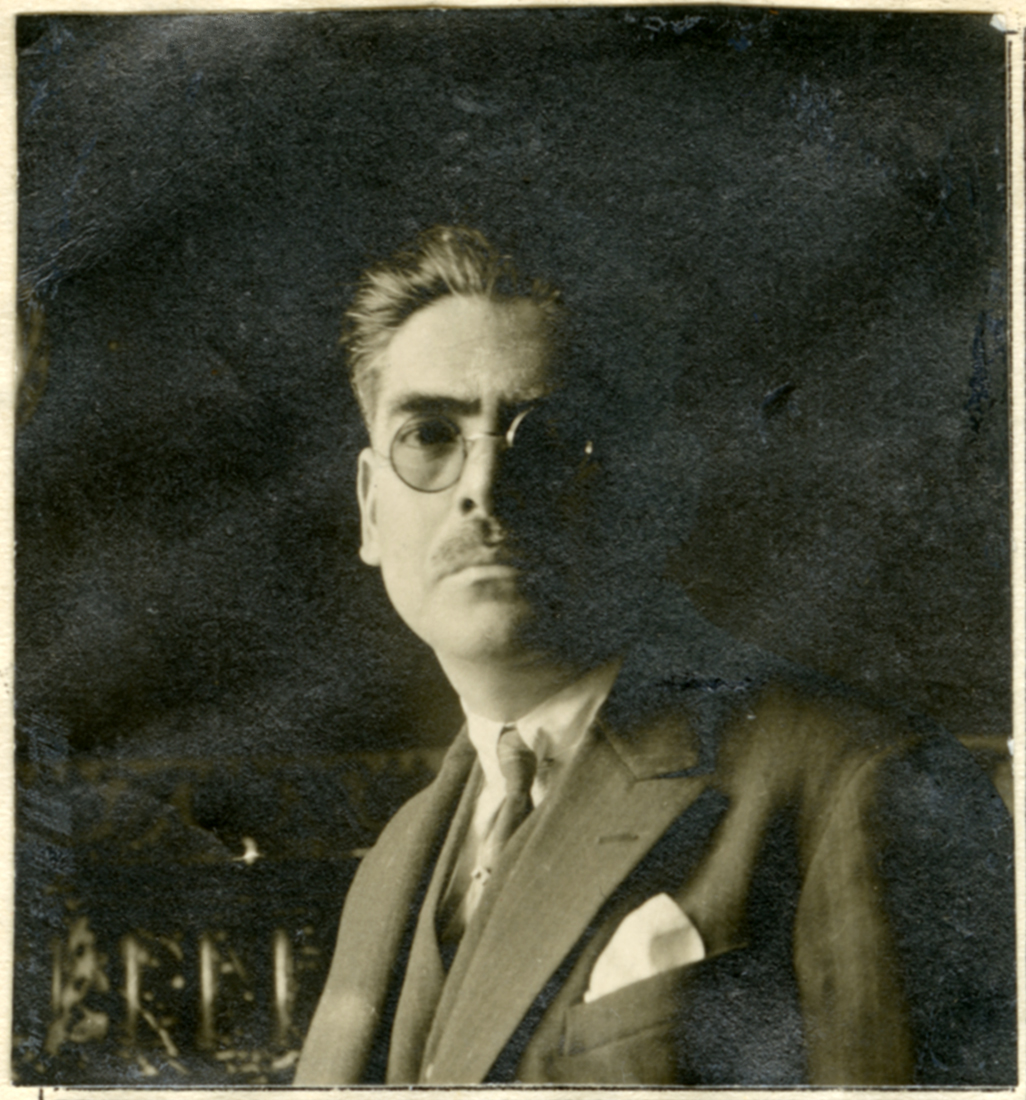 El Consejero Samuel del Campo. Fotografía de época anexa a su Hoja de Vida. ARCHIGRAL. Santiago de Chile.